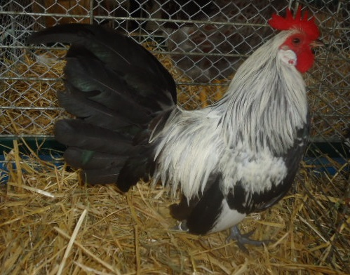 Coq argenté